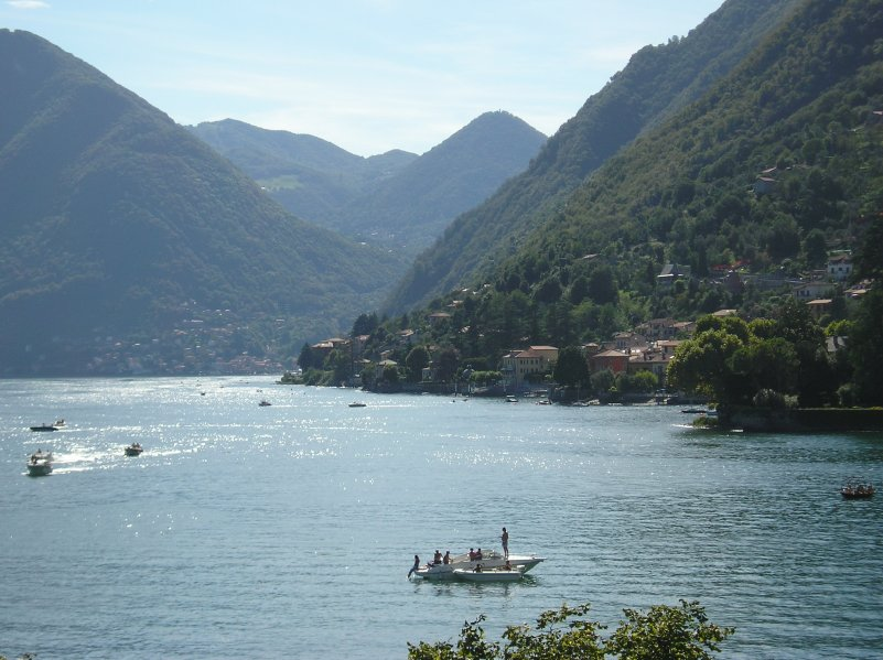 À propos de l'image Summary Lac de Côme, vu de l'ouest. Date Août 2004 Photographe amateur Photographie prise par François Trazzi